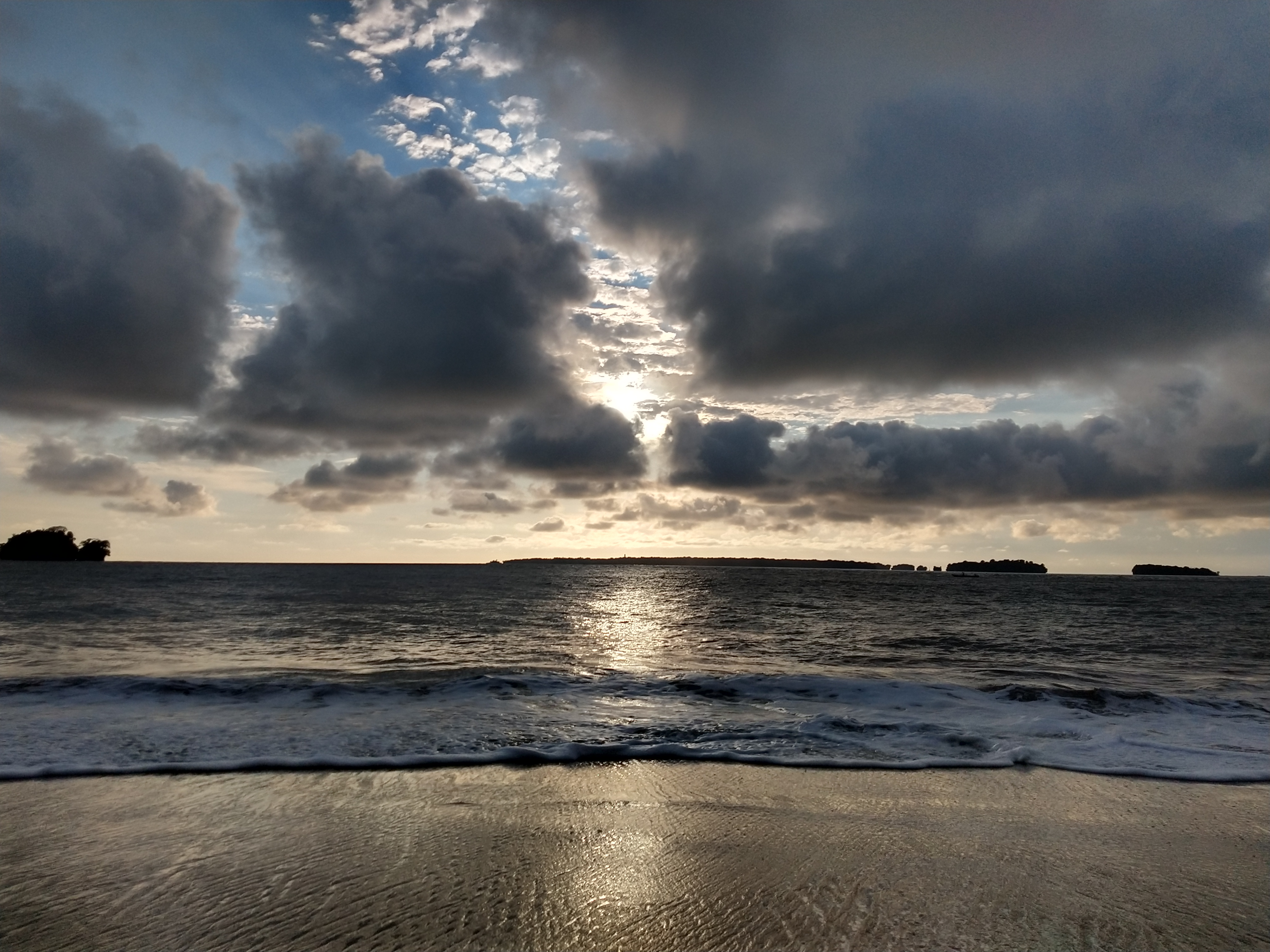 Esta fotografía fue tomada en el municipio colombiano con código 76109.